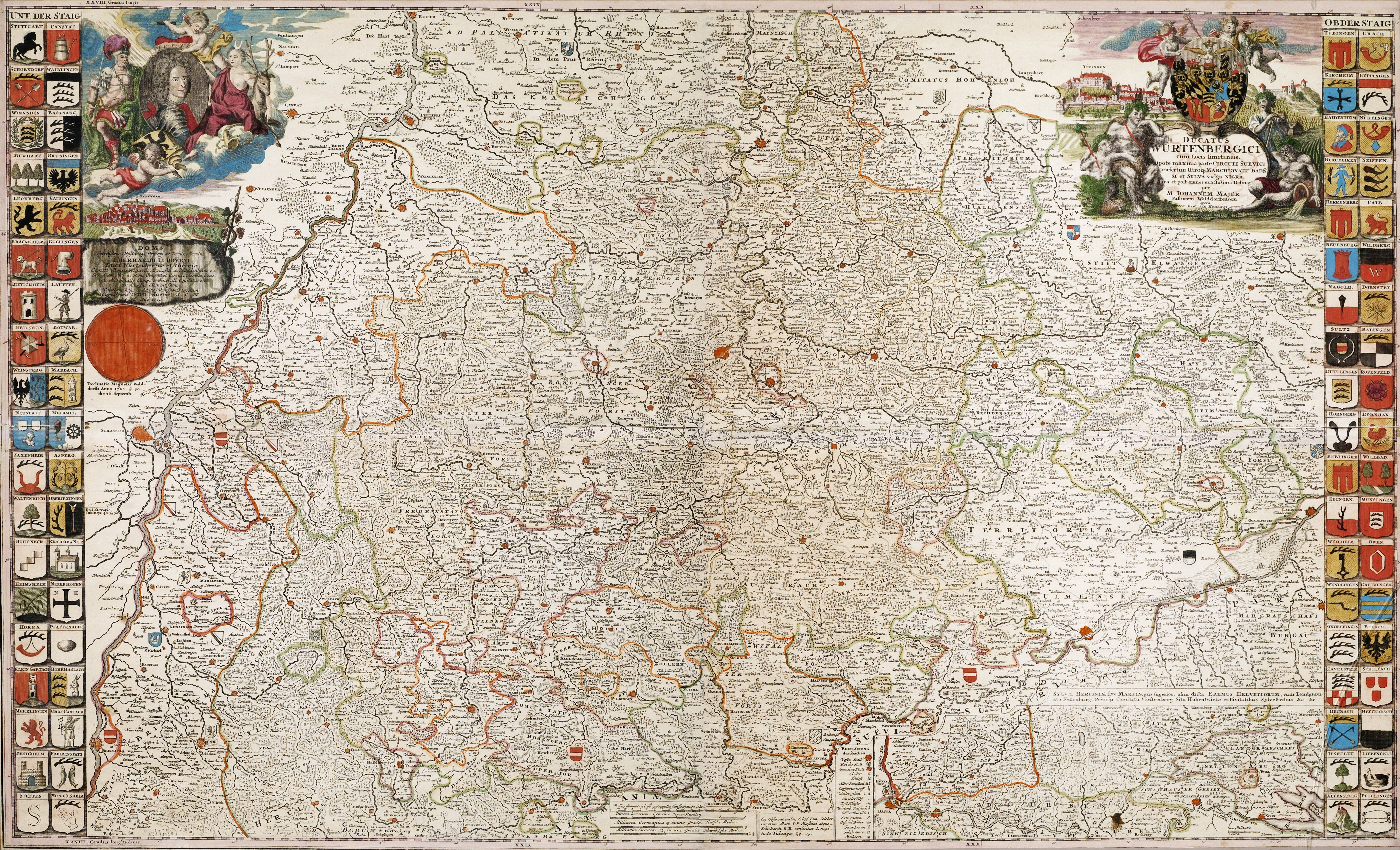 Ducatus Wurtenbergici cum Locis limitaneis..., linker und rechter Teil, mit württembergischen Wappen